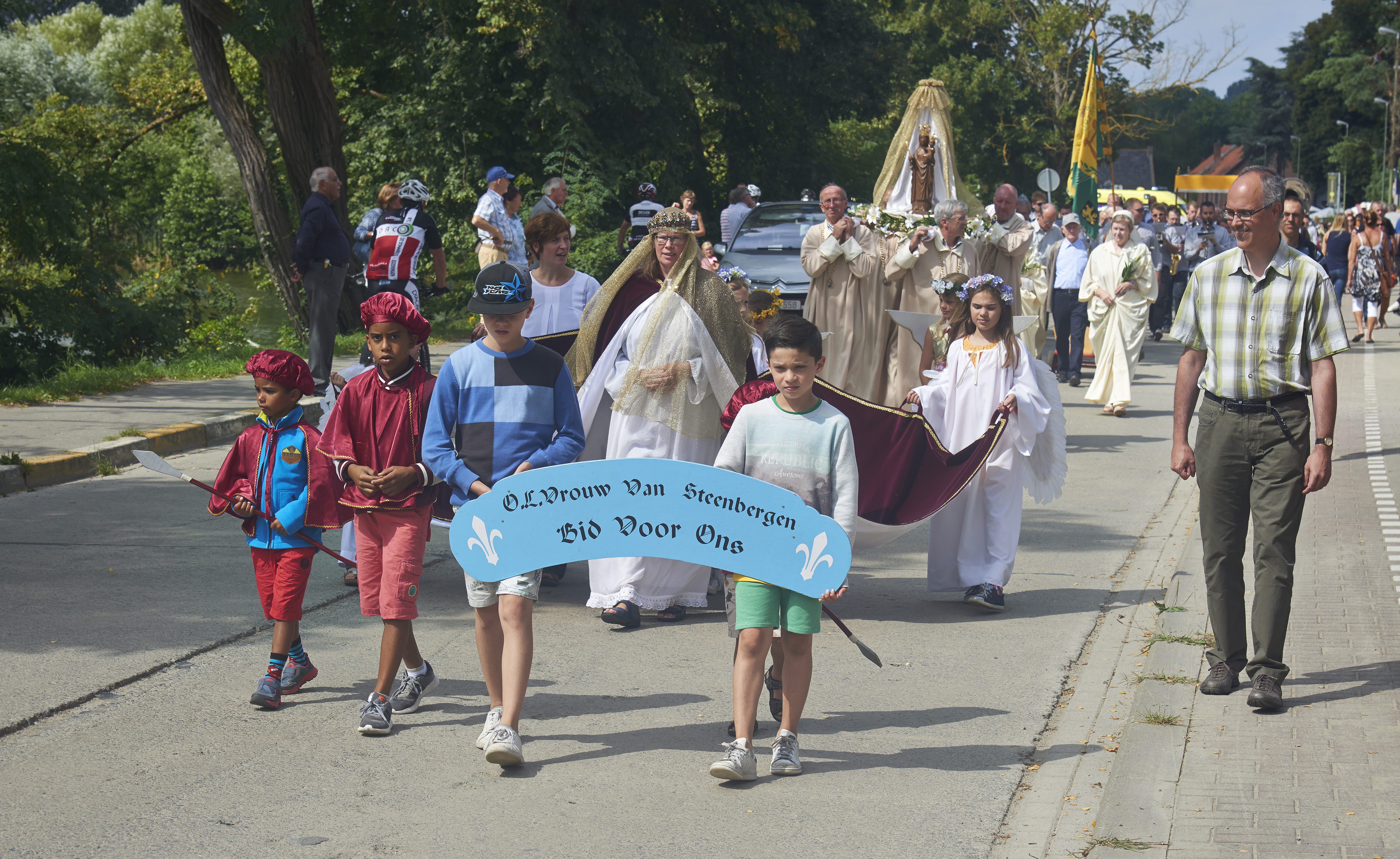 Processie O.L.V. van Steenbergen 15 augustus 2016